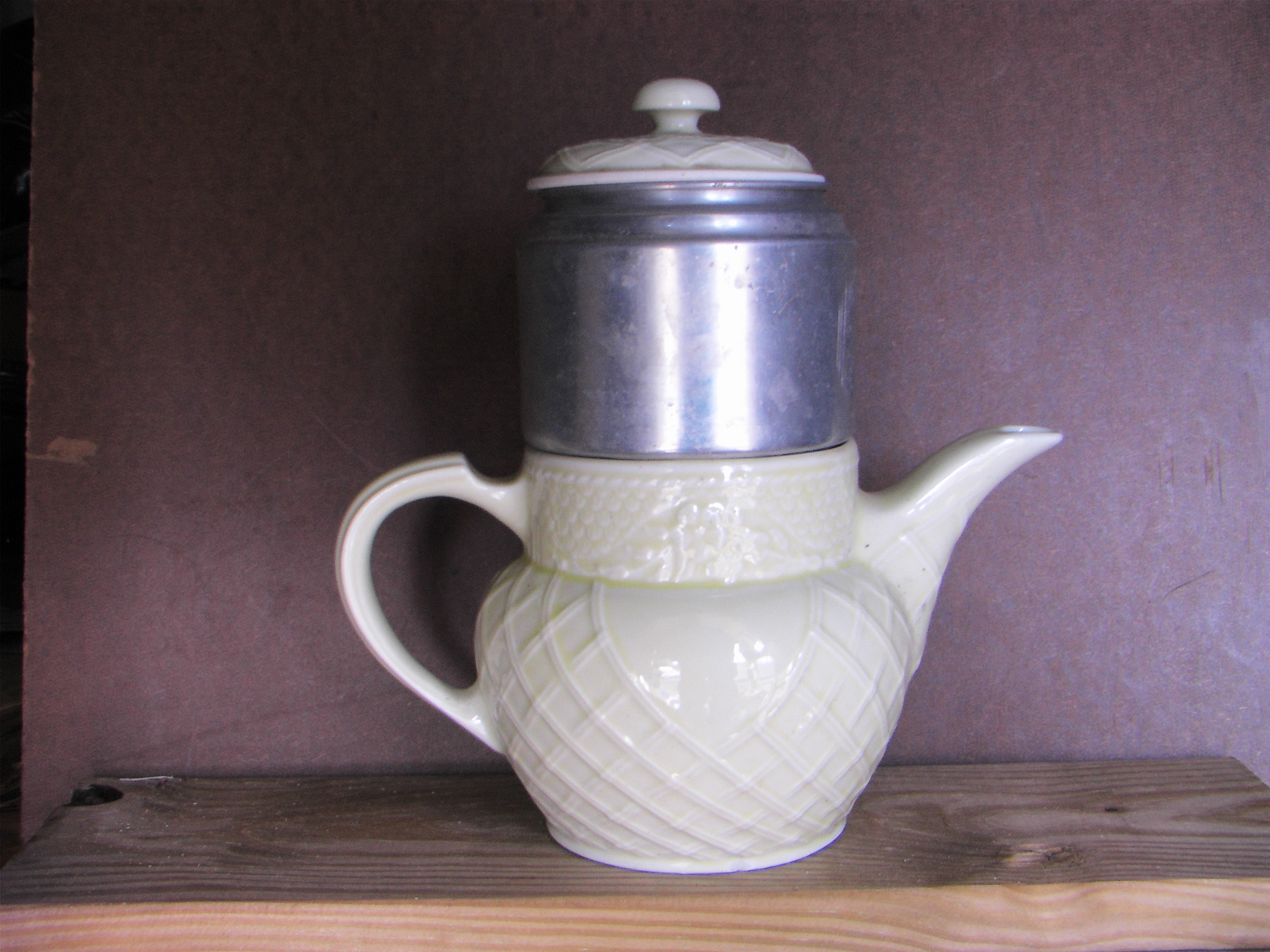 Velocicaptor